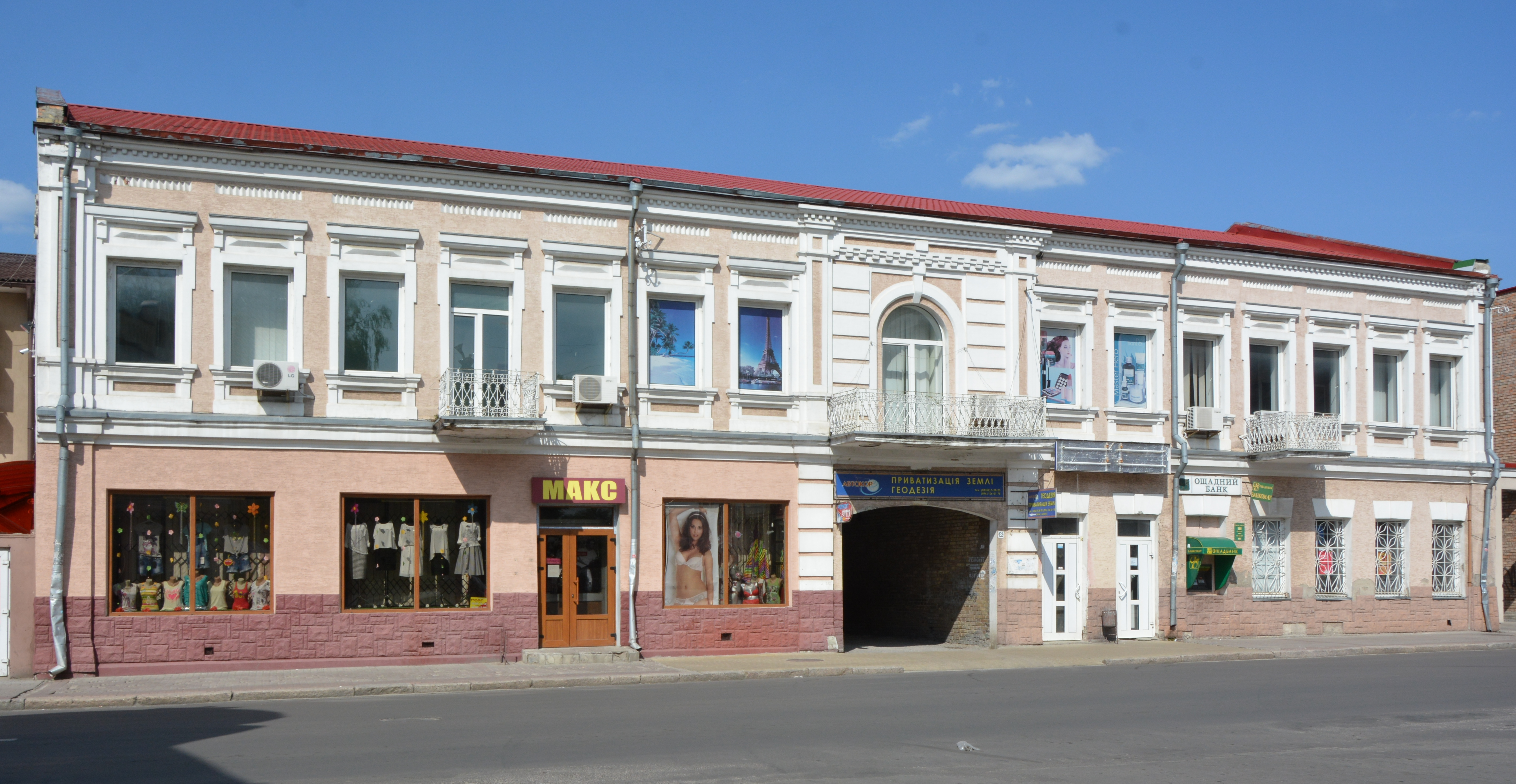 Житловий будинок (мур.), Ковель, вул. Незалежності, 132